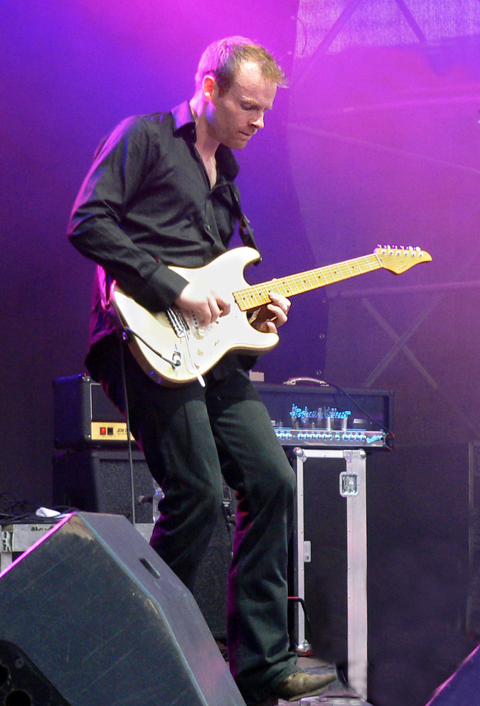 Joe Gooch